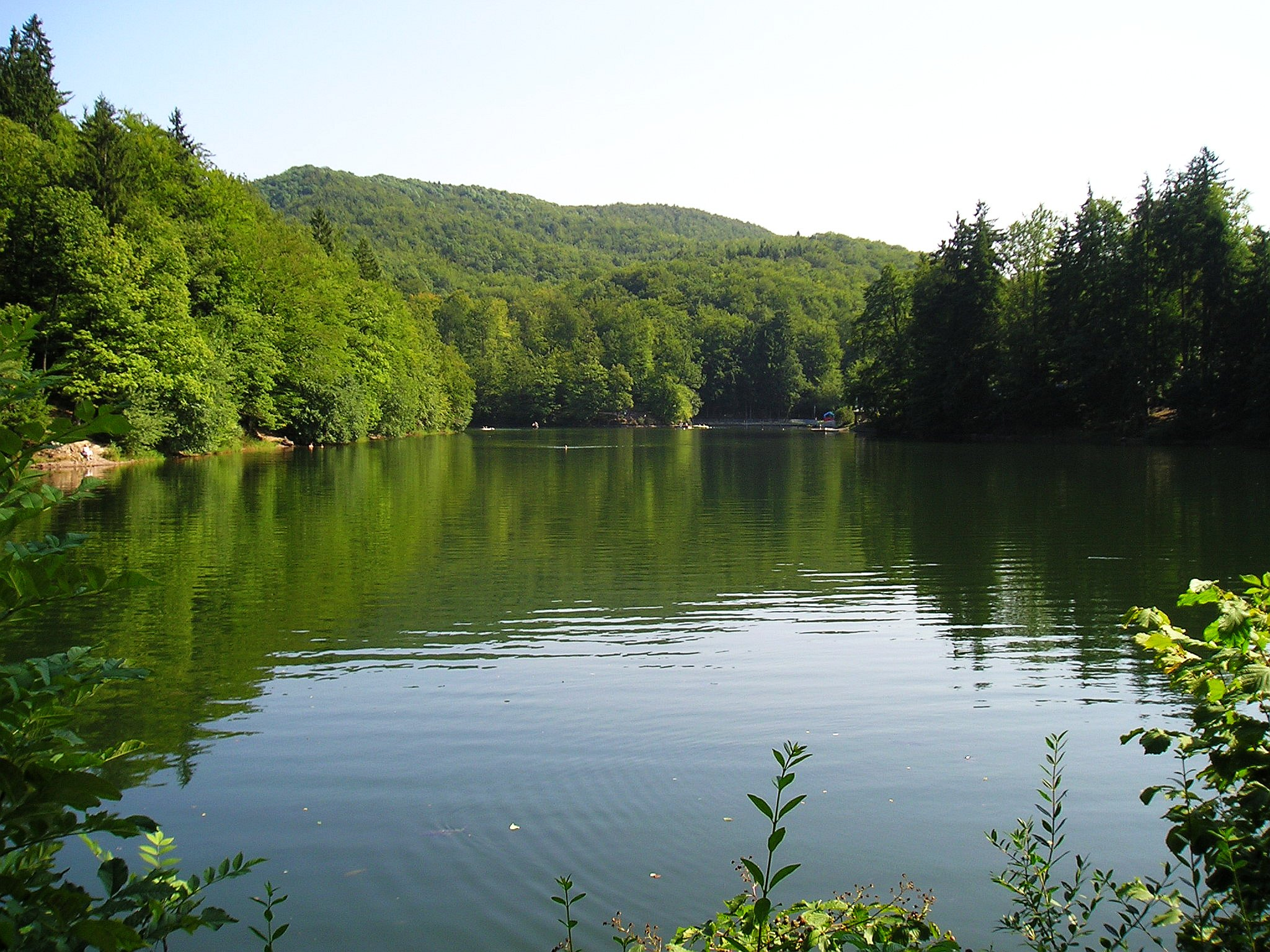 Wieserbeker Teich